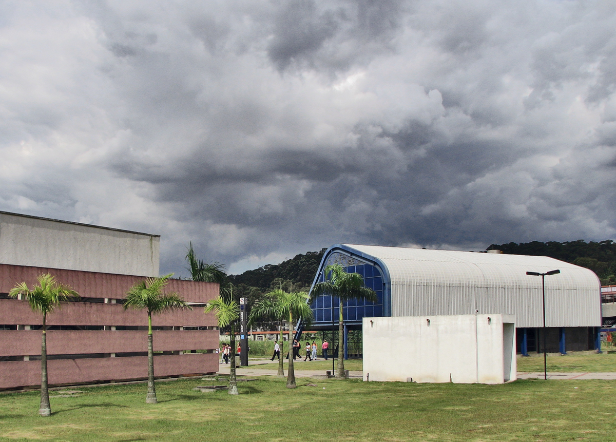 são paulo, quase guarulhos